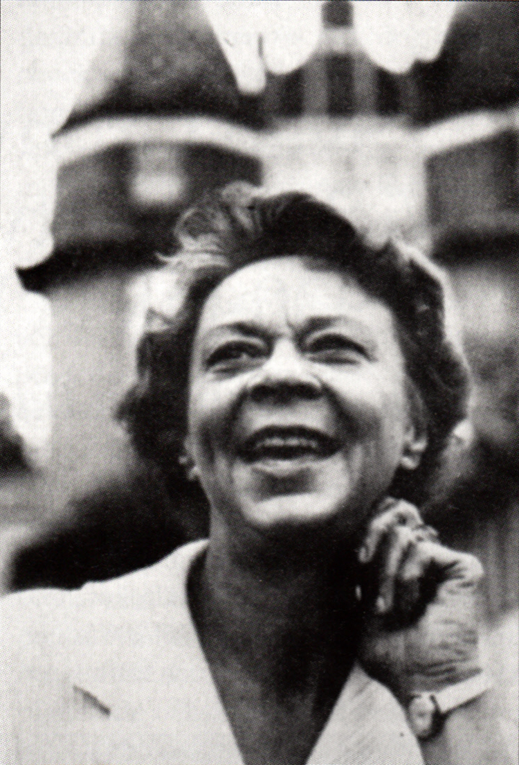 Författarinnan Eva Wichman.